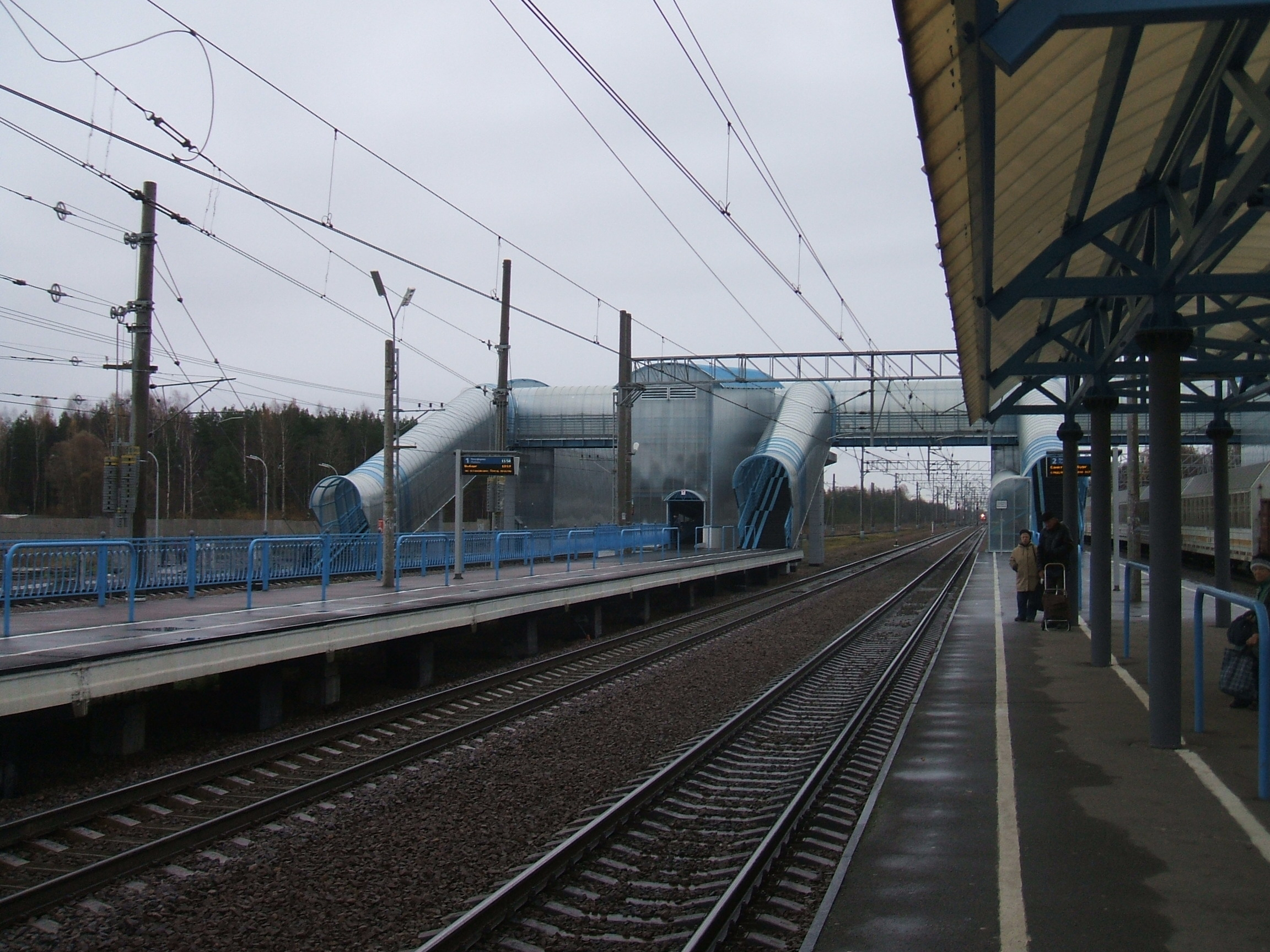 Белоостров Курортного района СПб Переход над скоростной железной дорогой построенный в 2011 году